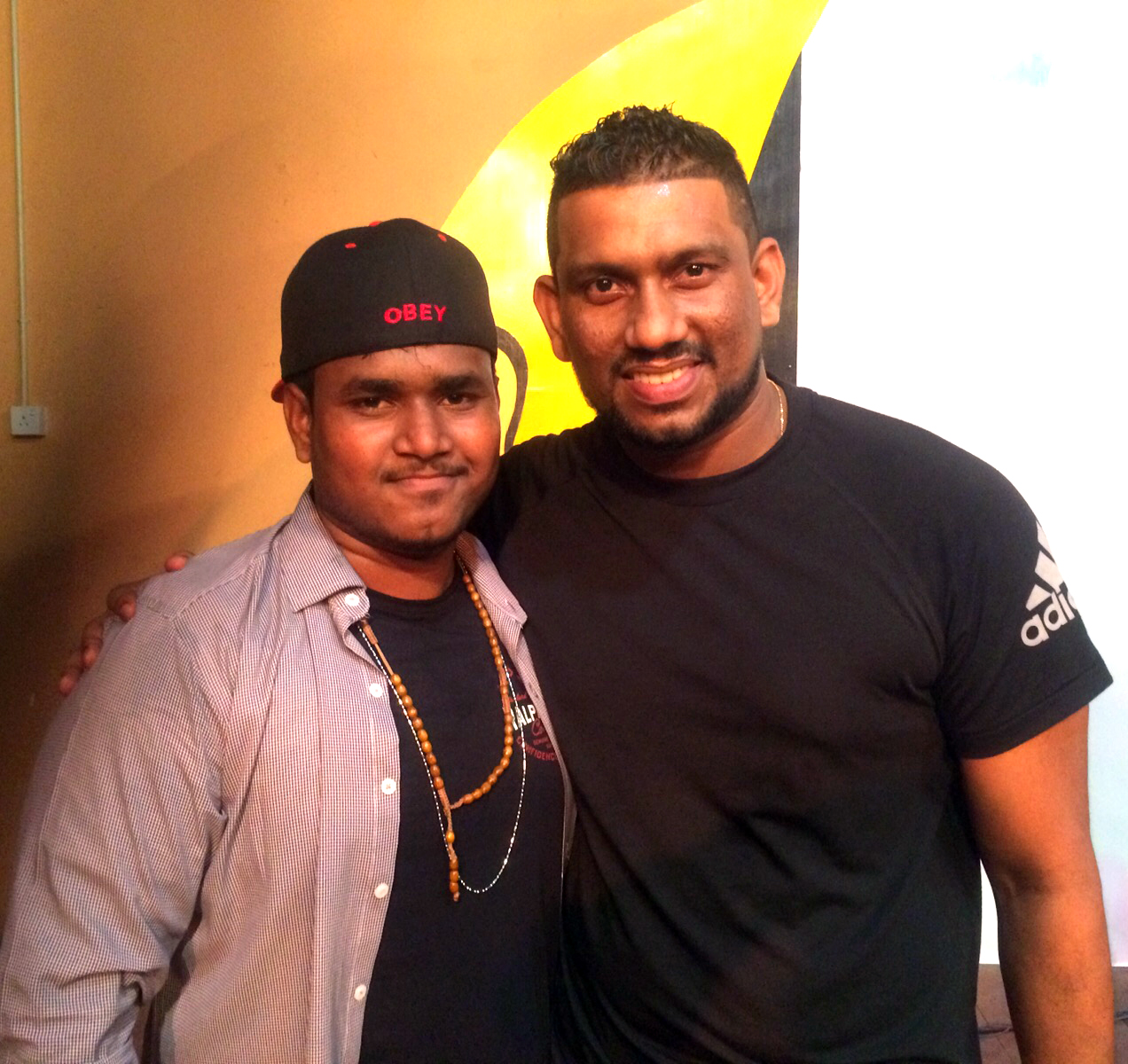 வேல்ஸ் விருது வழங்கும்விழாவின் போது